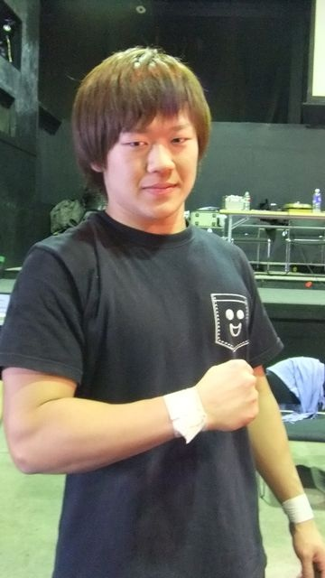 プロレスラー、遠藤哲哉。